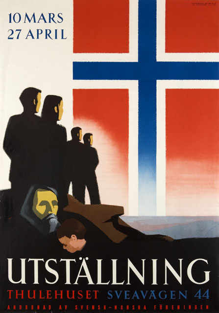 Utställningsaffisch för Norska utställningen 1943